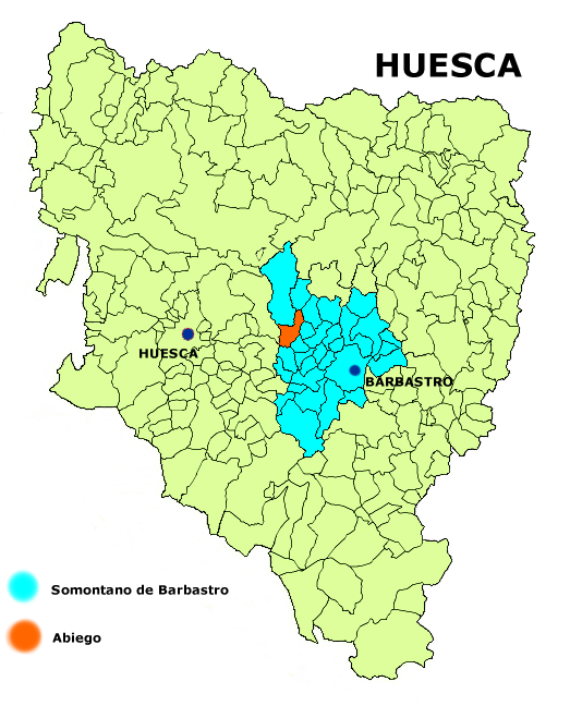 Mapa del municipio de Abiego Abiego